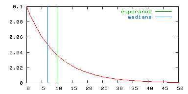 densité de loi exponentielle ave espérance et médiane. Image personnelle créée avec Gnuplot. Domaine public.